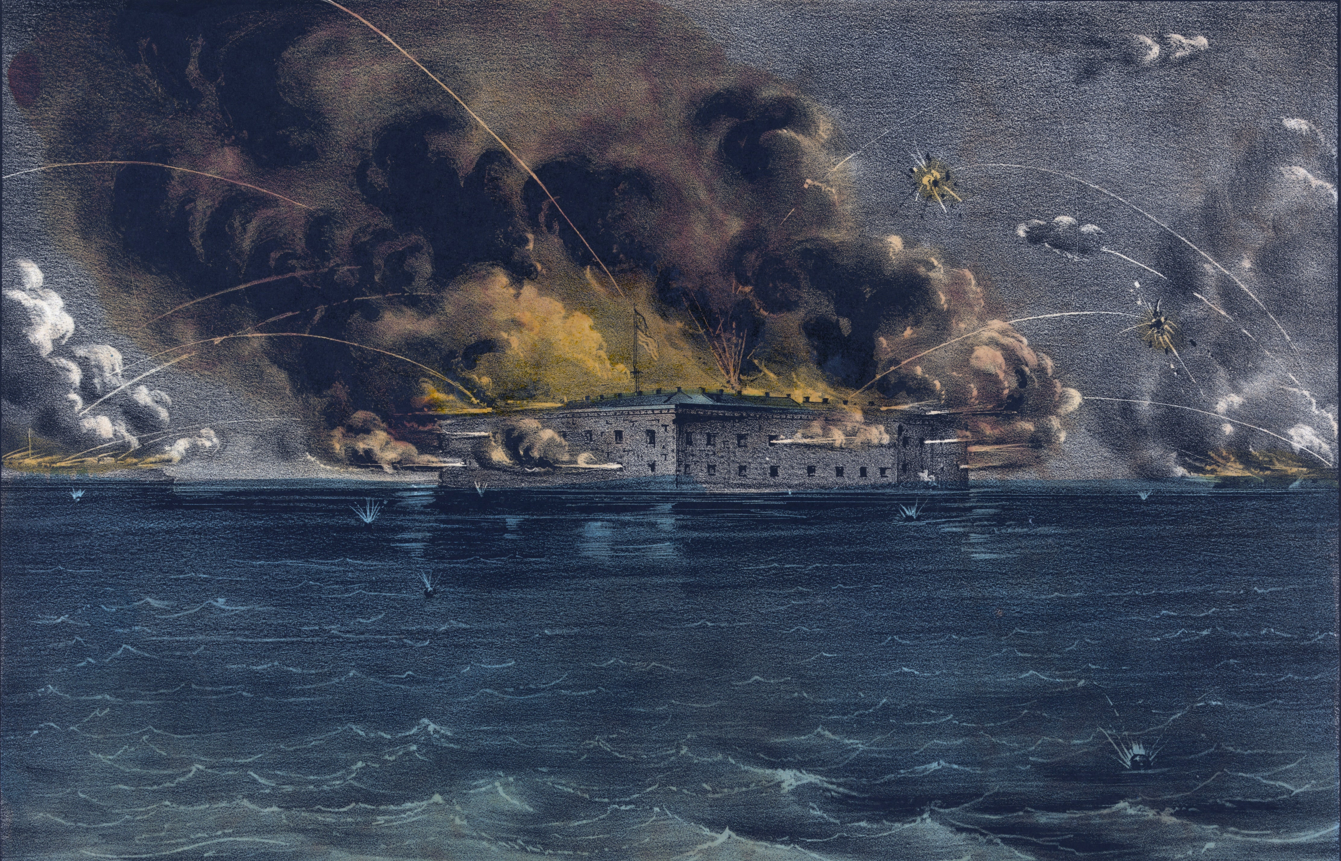 Attack against Fort Sumter - 1861